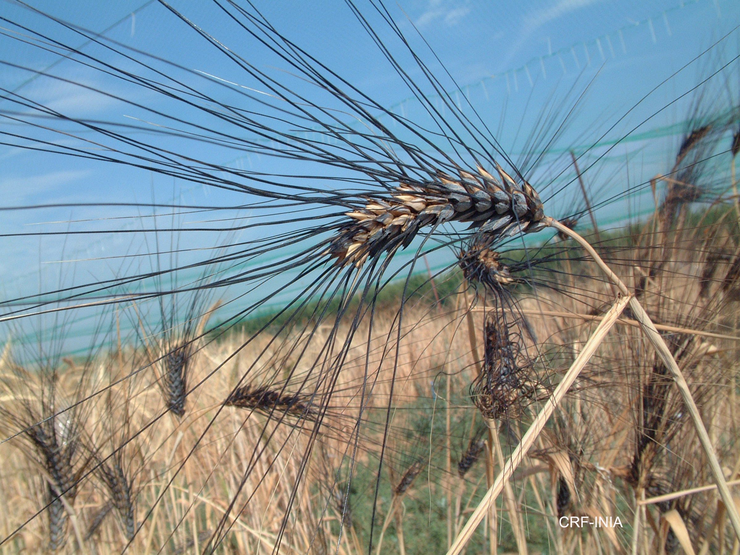 Espiga trigo turgidum primer plano